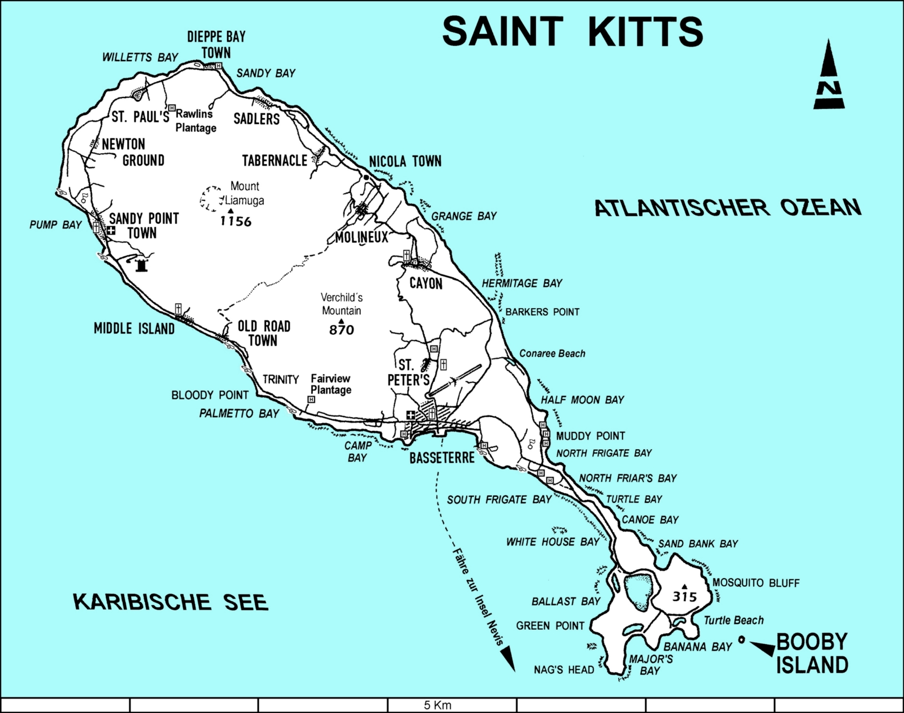 Karte von Saint Kitts